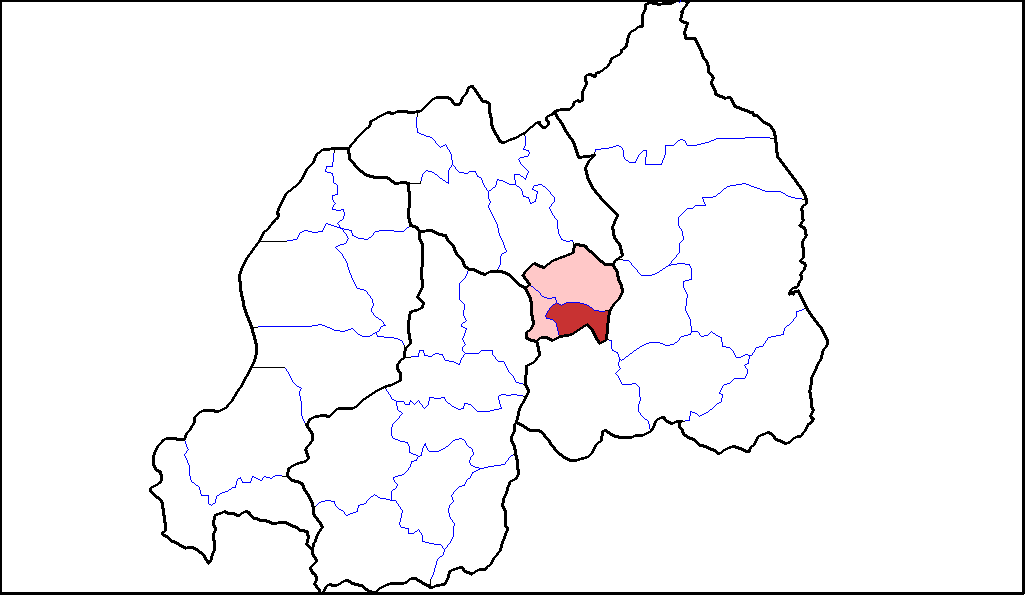 Distretto di Kicukiro.